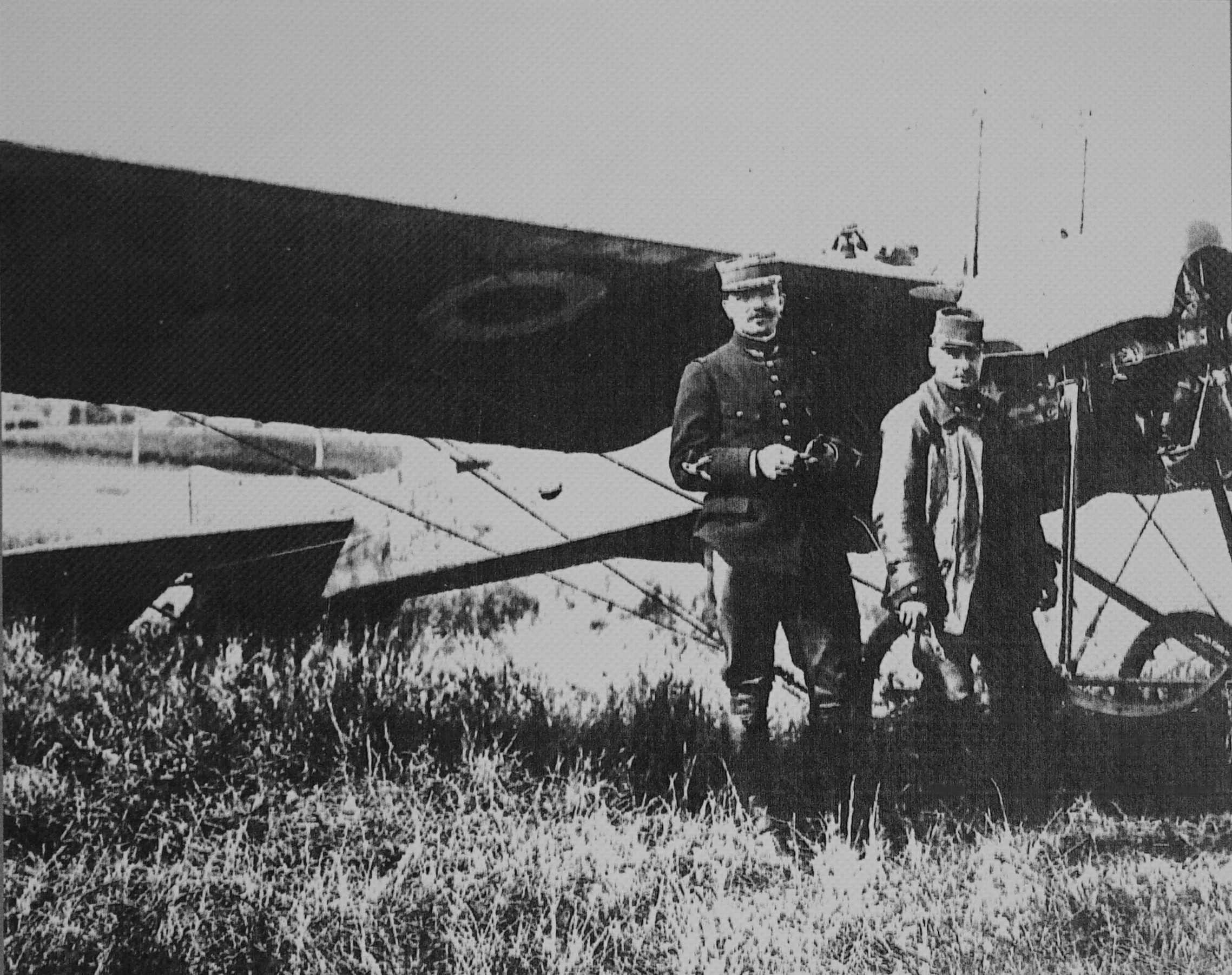 vue de cf. titre.